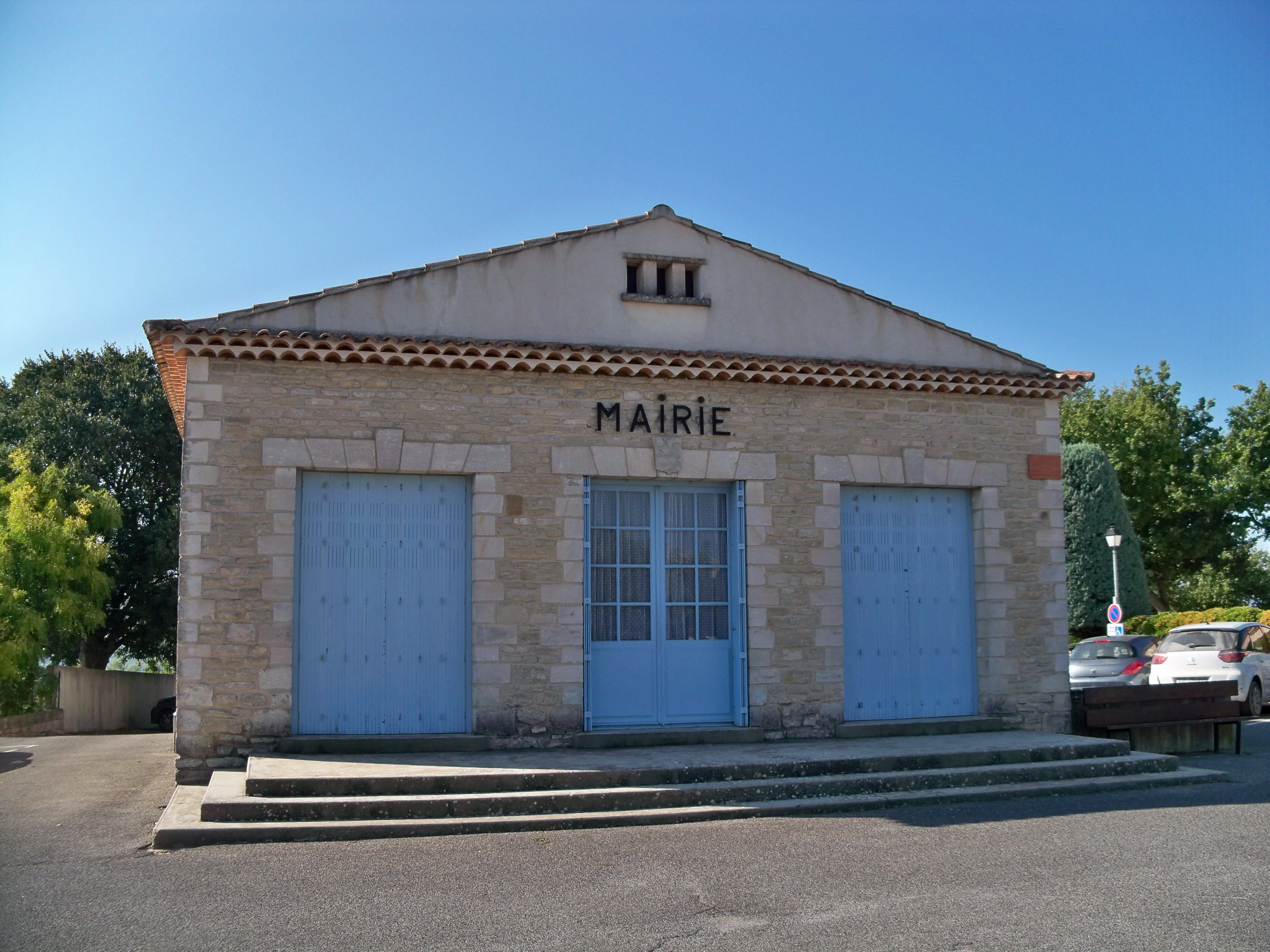 Mairie de Goult (84)